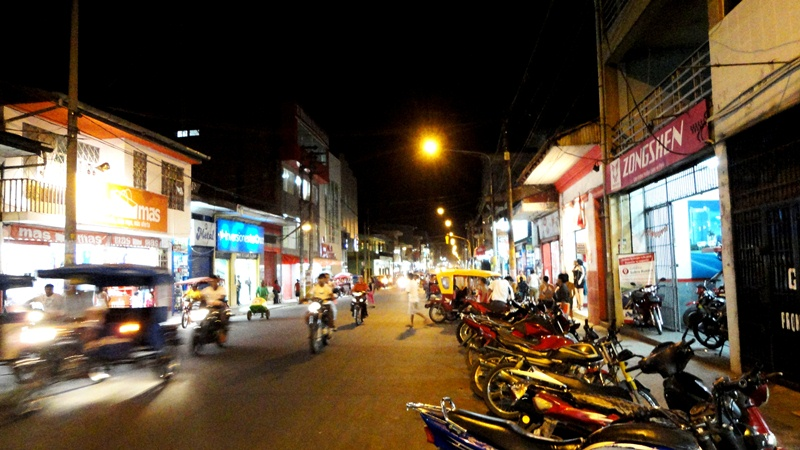 Una cuadra de la jirón Próspero, una de las avenidas más grandes de la ciudad con numerosas tiendas a lo largo de su extensión.